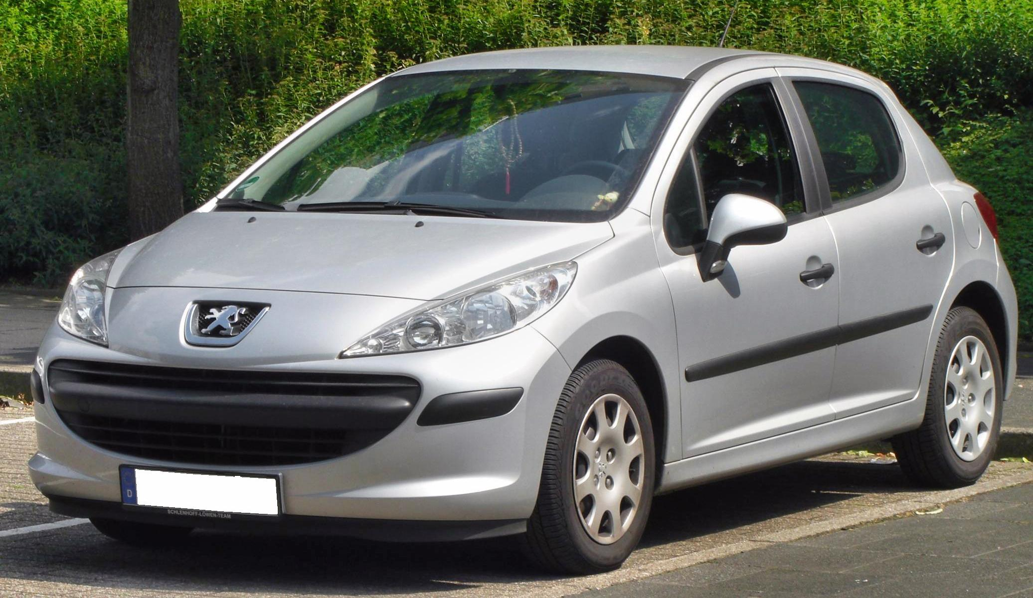 Novus Peugeot 207